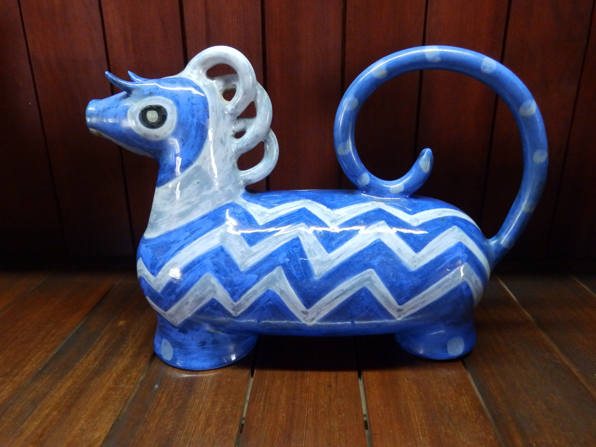 Περίοδος ΑΚΕΛ 1951